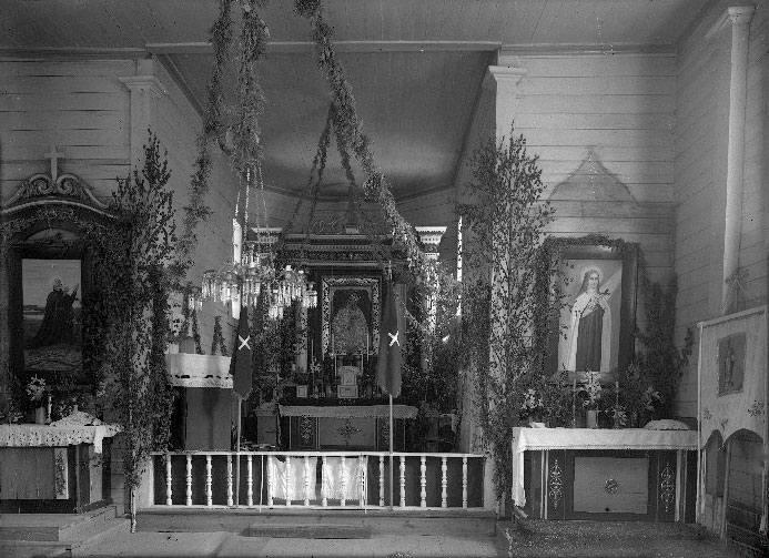 Беларуская (тарашкевіца): Ахова (Achova). Царква